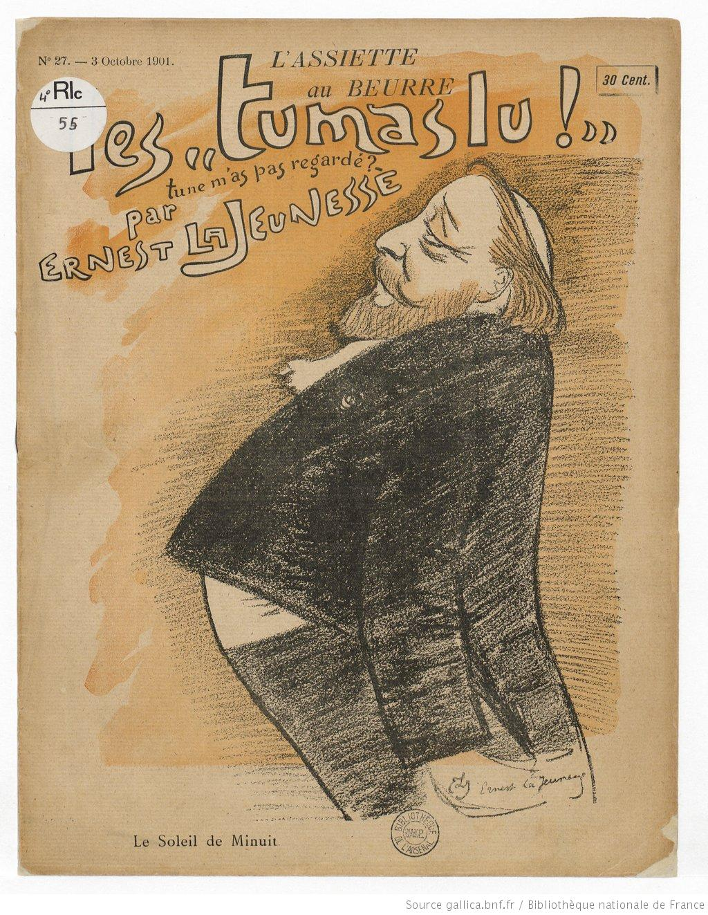 Couverture du Numéro 27 du 3 octobre 1901.